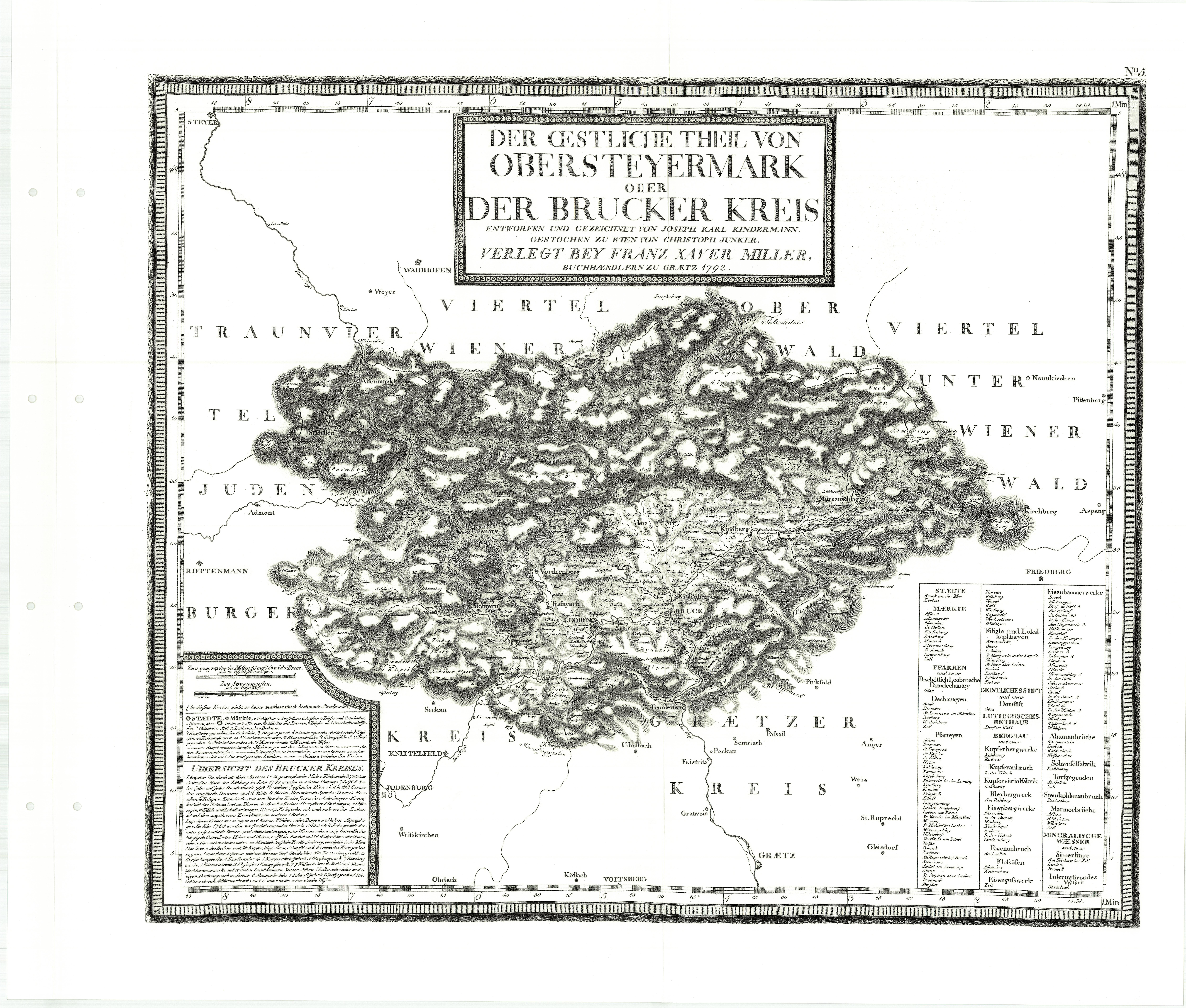 Der östliche Teil von Obersteiermark oder der Brucker Kreis im Herzogtum Steyermark